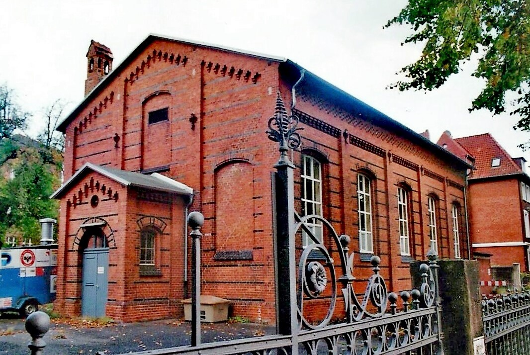 Turnhalle der einstigen Schule. Vor dem Bau der St. Matthäi-Kirche hielt Pastor Haensel vor neuen Gemeinde in diesem provisorischen Gotteshaus Gottesdienste. Die 150 Stühle reichten in diesen ersten Gottesdiensten oft nicht aus. Auch Turngeräte, Schwebebalken, Barren, Böcke, dienten als Sitzmöglichkeiten. Zur Grundsteinlegung der St. Matthäi-Kirche zog die Gemeinde am 12. Februar 1899 aus der "Turnhallenkirche" zur Baugrube hinüber. Vorabbildnis